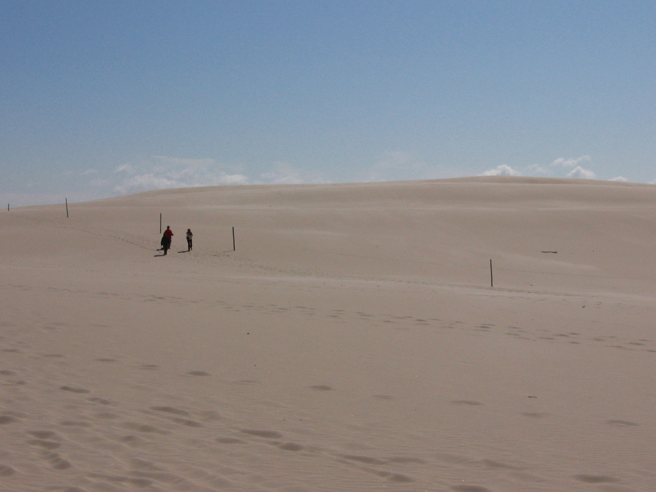 Pustynny krajobraz na wydmach w Słowińskim Parku Narodowym koło Łeby